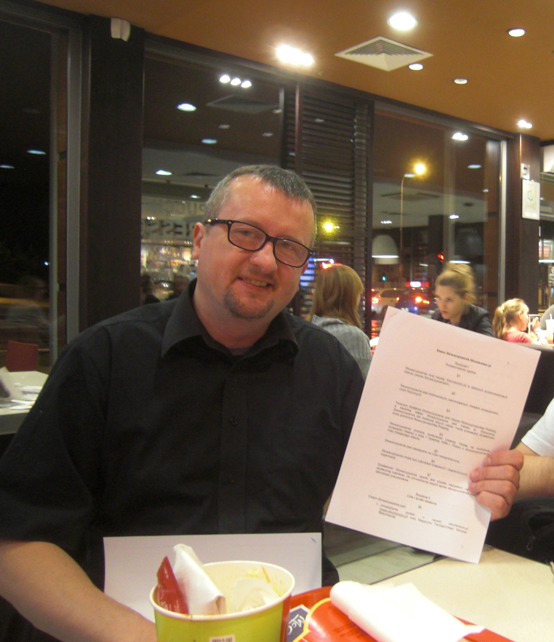 Członkowie redakcji Ekumenizm.pl, Dariusz Bruncz i Adam Ciućka